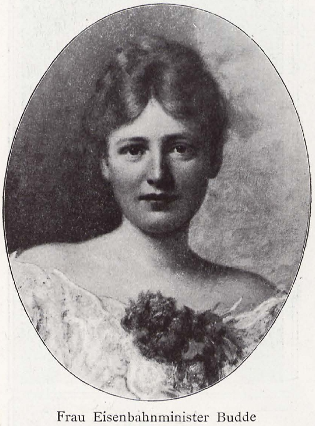 Johanna Helene Auguste Marie Budde, geborene Heyland, Ehefrau des Eisenbahnministers Hermann Budde, 1903.